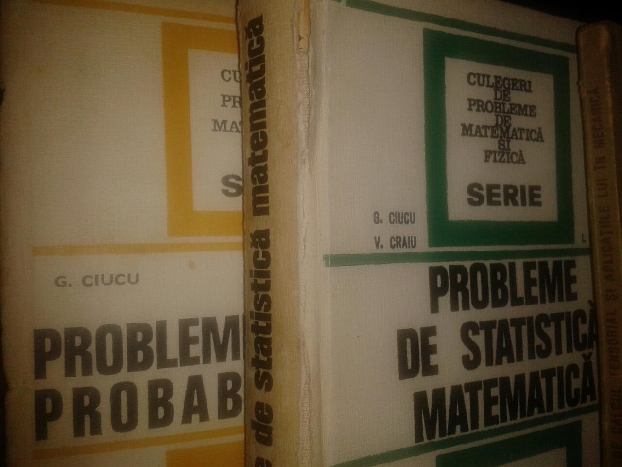 coperti